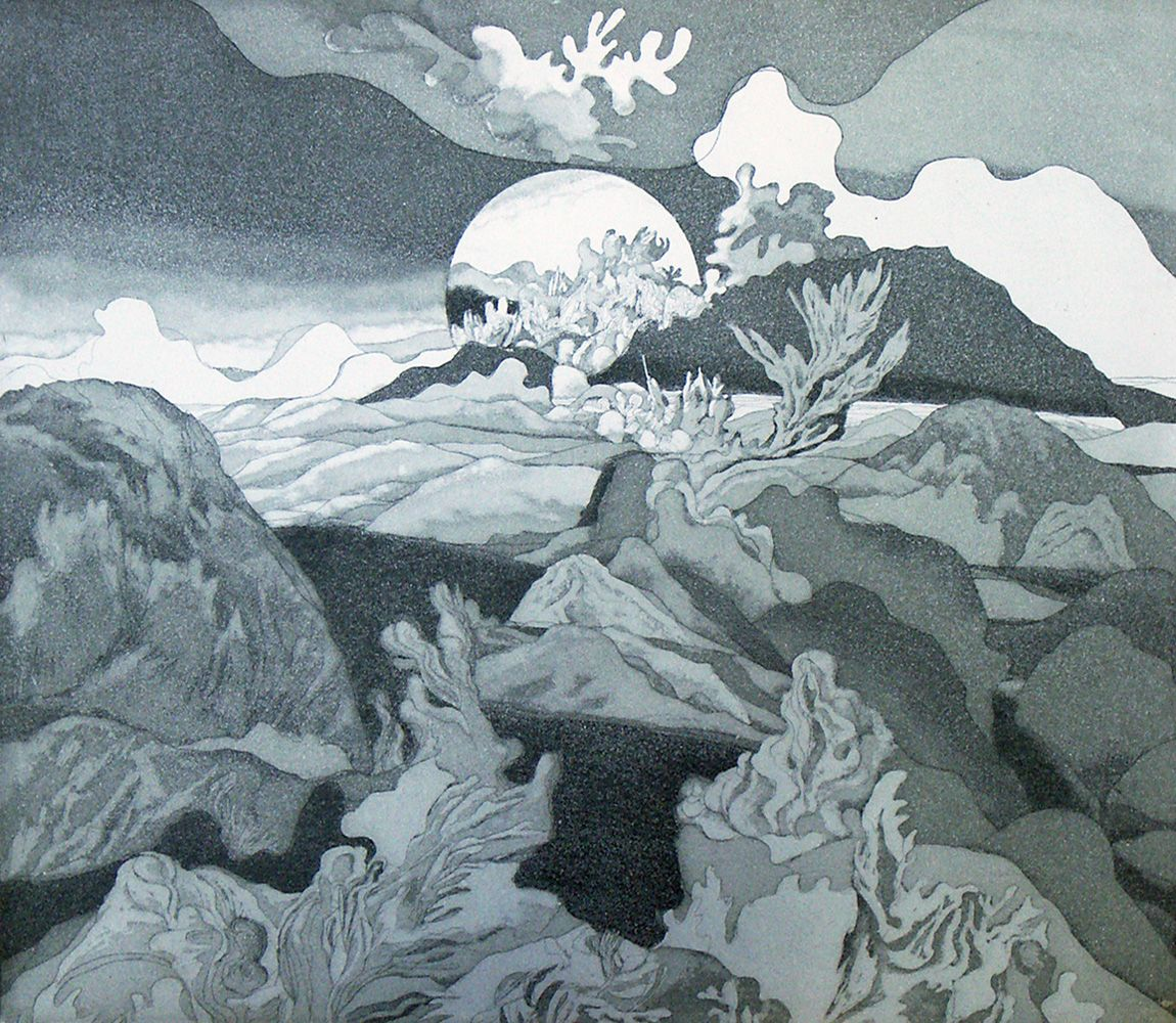 Foto einer Grafik von Peter Sylvester auf einer Steinplatte auf seinem Grab auf dem Leipziger Südfriedhof